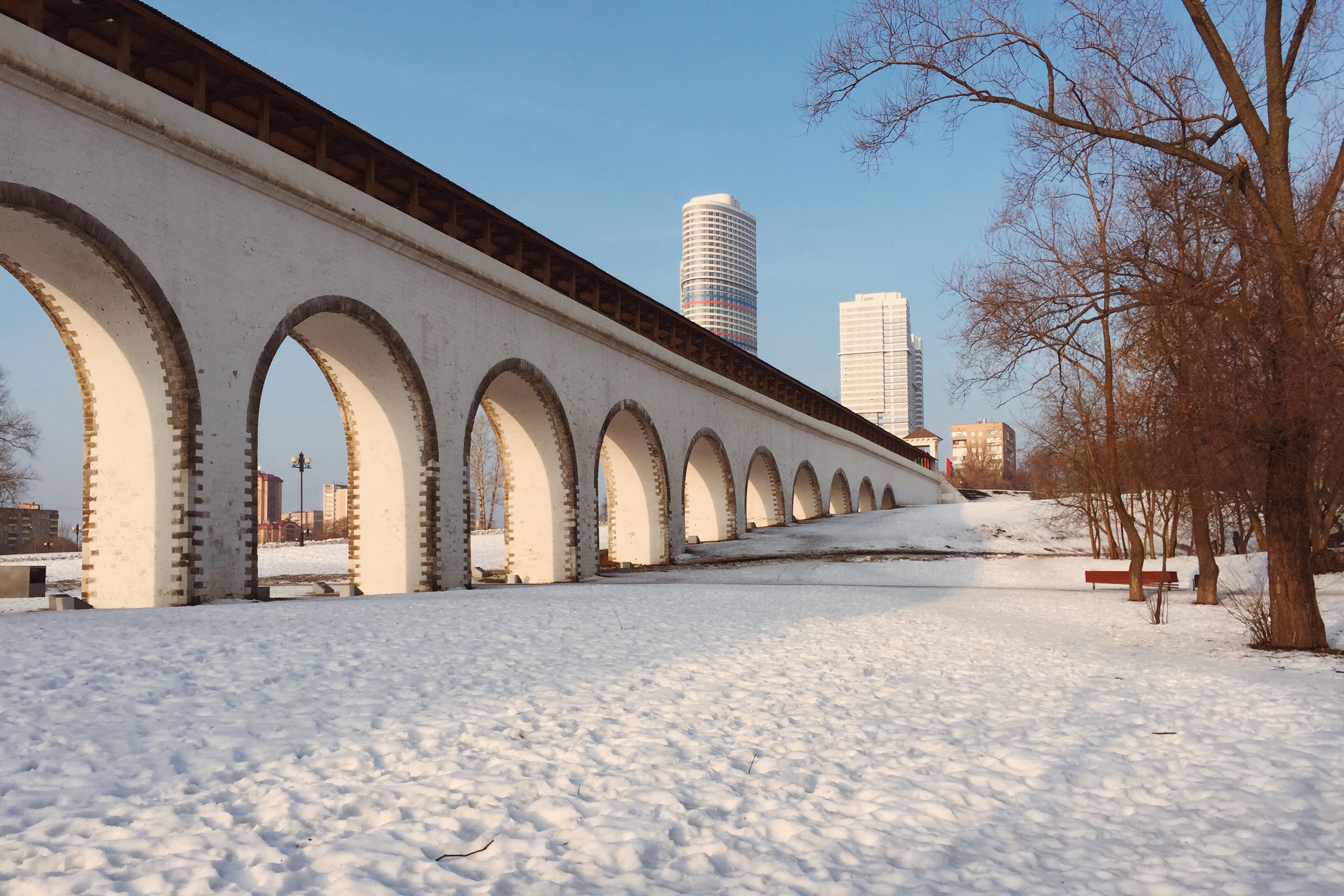 Ростокинский акведук